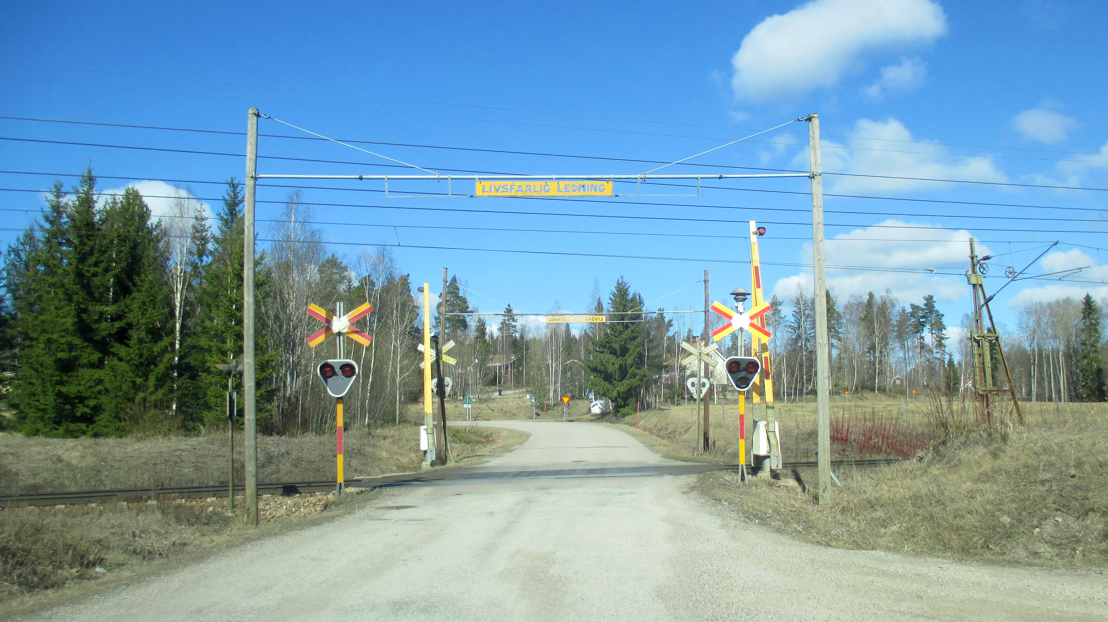 Järnvägsövergång med bommar i Karbenning, Karbennings socken, Norbergs kommun, Västmanlands län, Västmanland, Sverige.